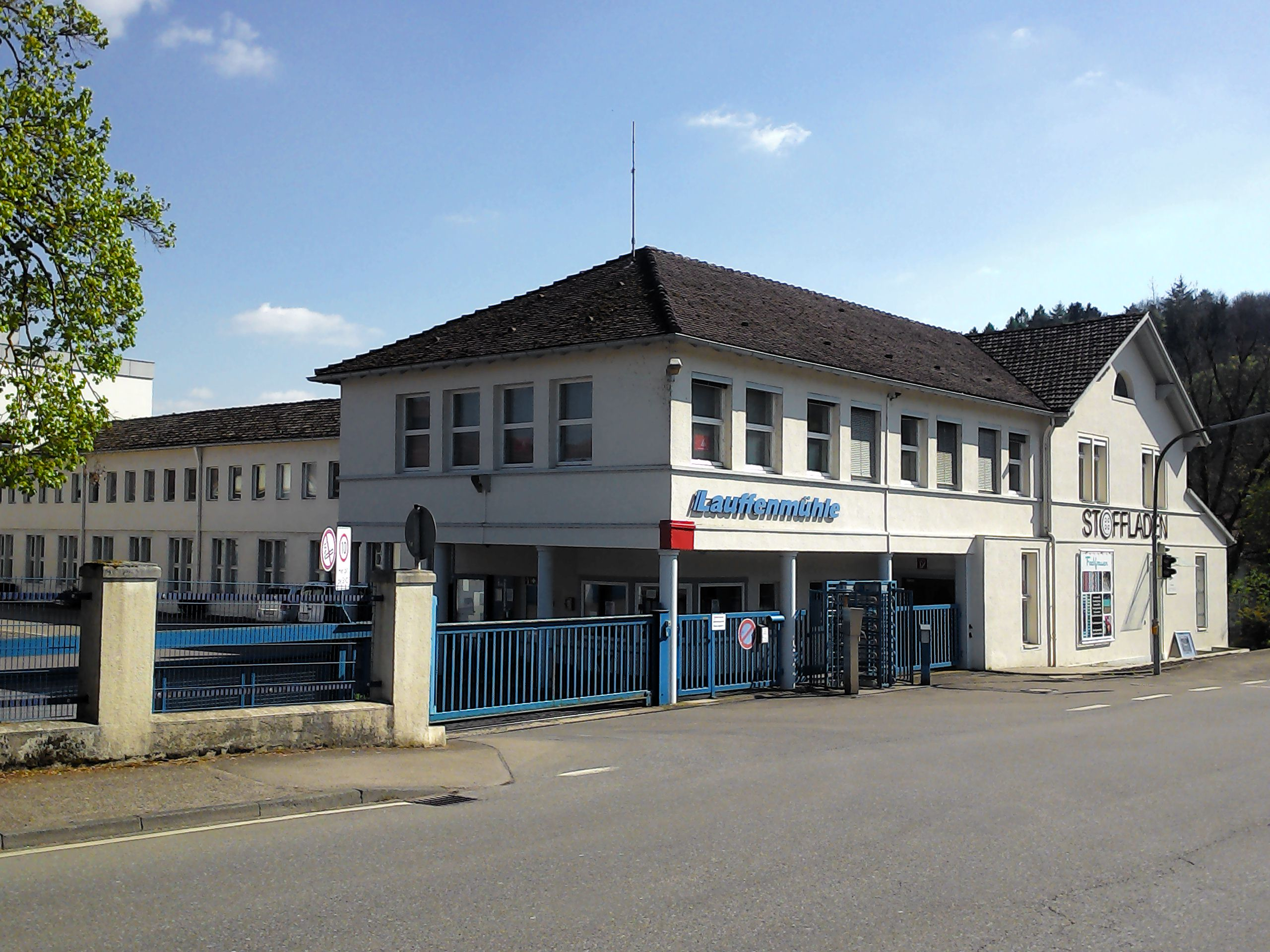 Textilunternehmen Lauffenmühle in Lauchringen, Landkreis Waldshut, Baden-Württemberg. Eingangsbereich.